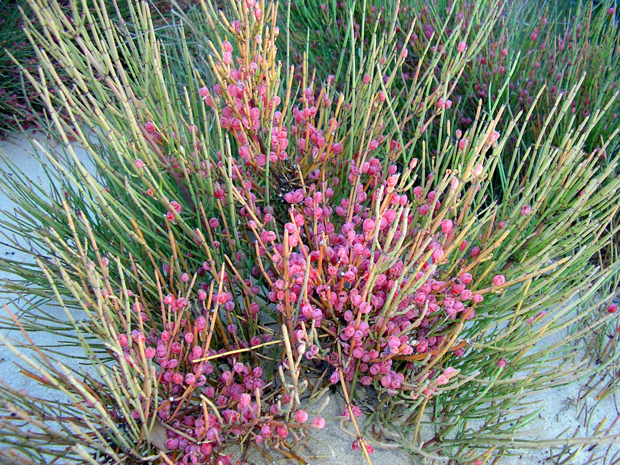 Ephedra fragilis, fotografía realizada en el Paraje natural de las marismas del Río Palmones en Algeciras (España).